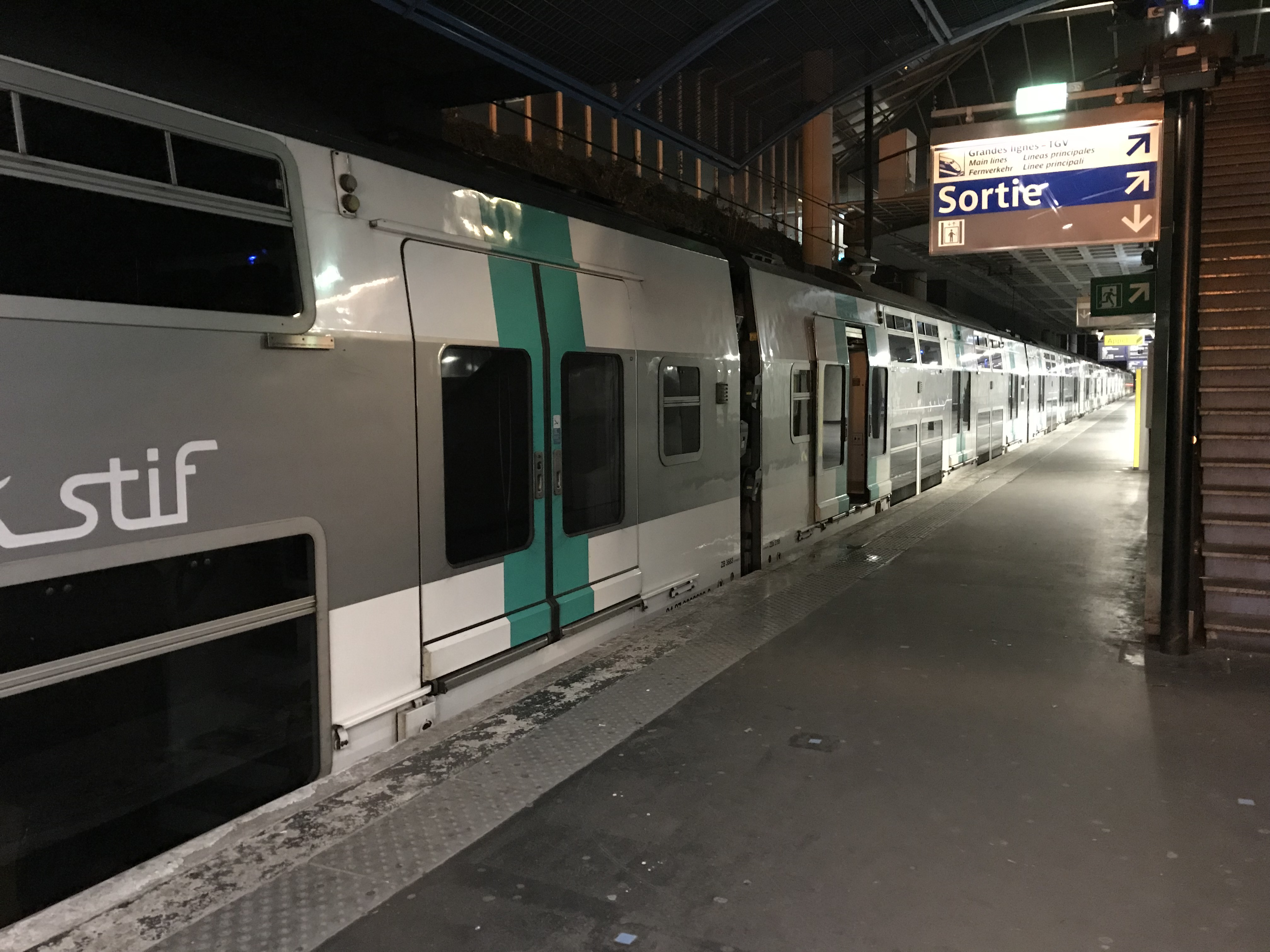 Quai du RER A, Gare de Marne-la-Vallée - Chessy, Seine-et-Marne.